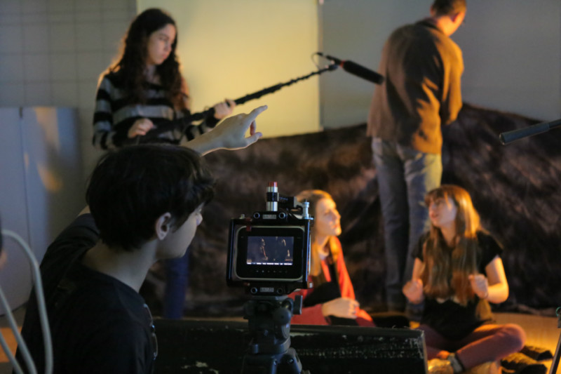 מגמת קולנוע – תיכון עירוני א' לאמנויות